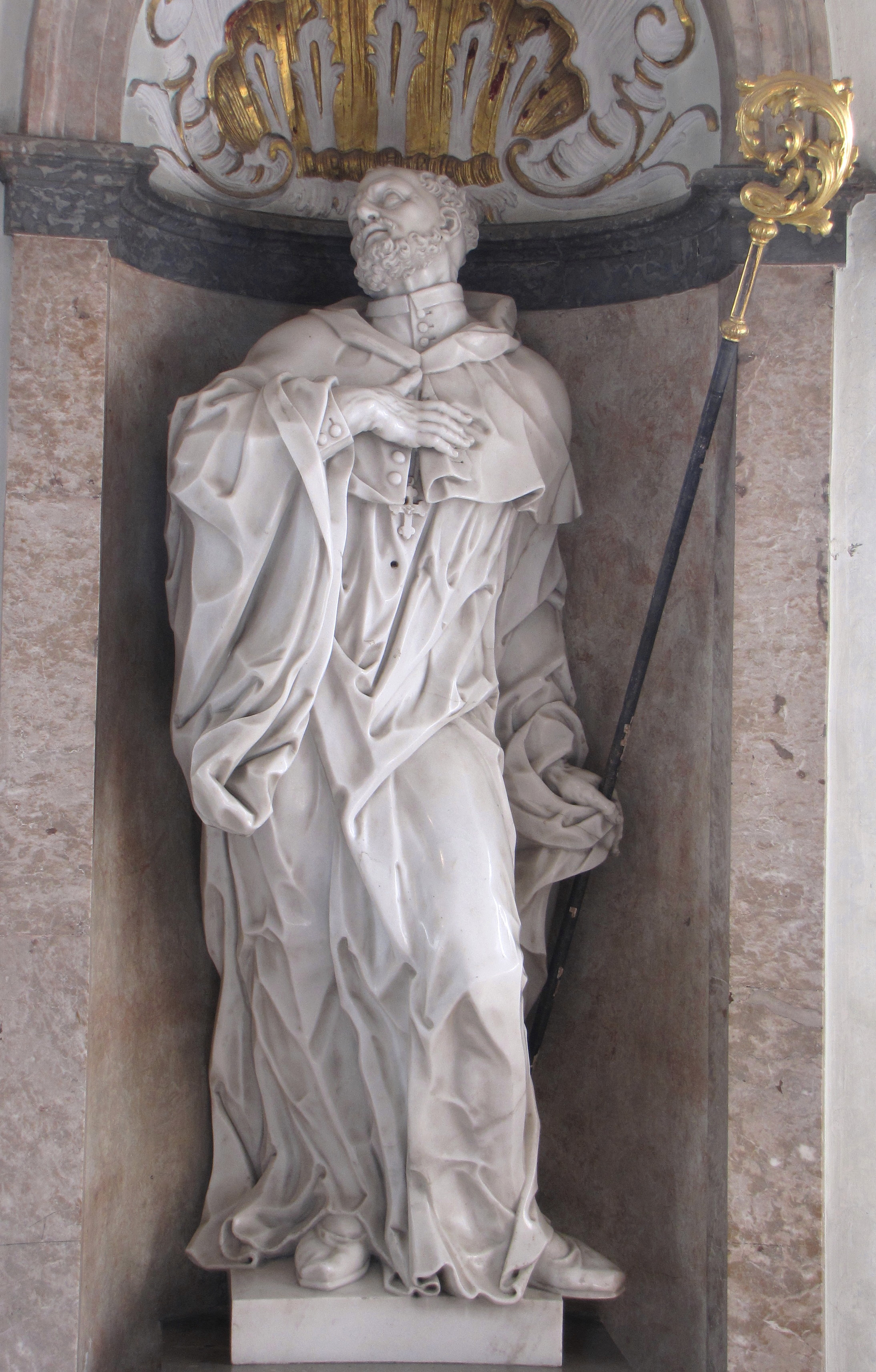 Hl. Kolumban von Anton Sturm in der Magnuskapelle in Füssen